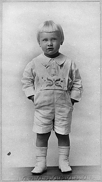 Gerald Ford w 1916 roku (za biblioteką Forda)